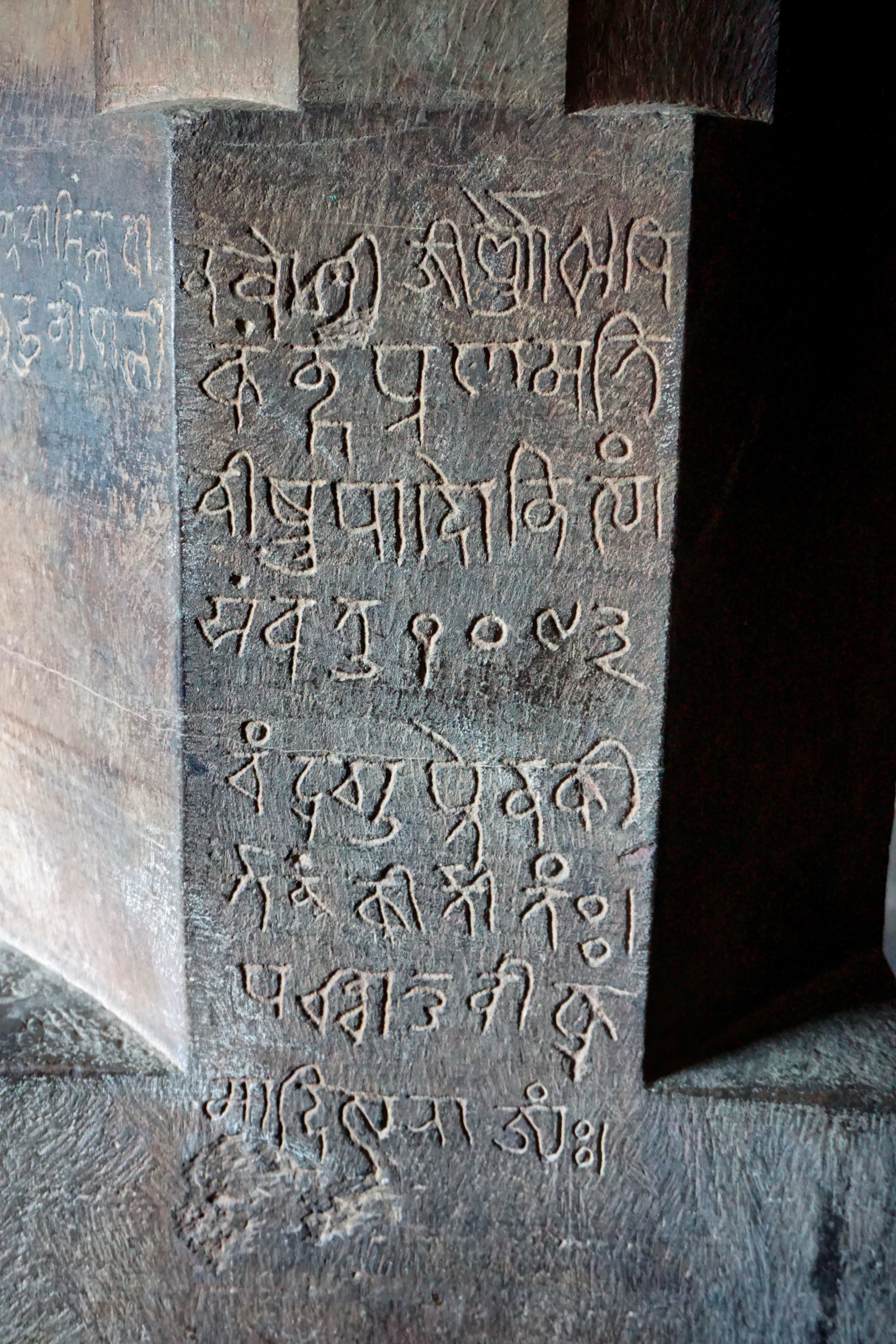 Cave 19 Udayagiri Madhya Pradesh, Nagari script Sanskrit inscription, Vikrama Samvat 1093 (1036-1037 CE). Udayagiri Caves, Vidisha, India